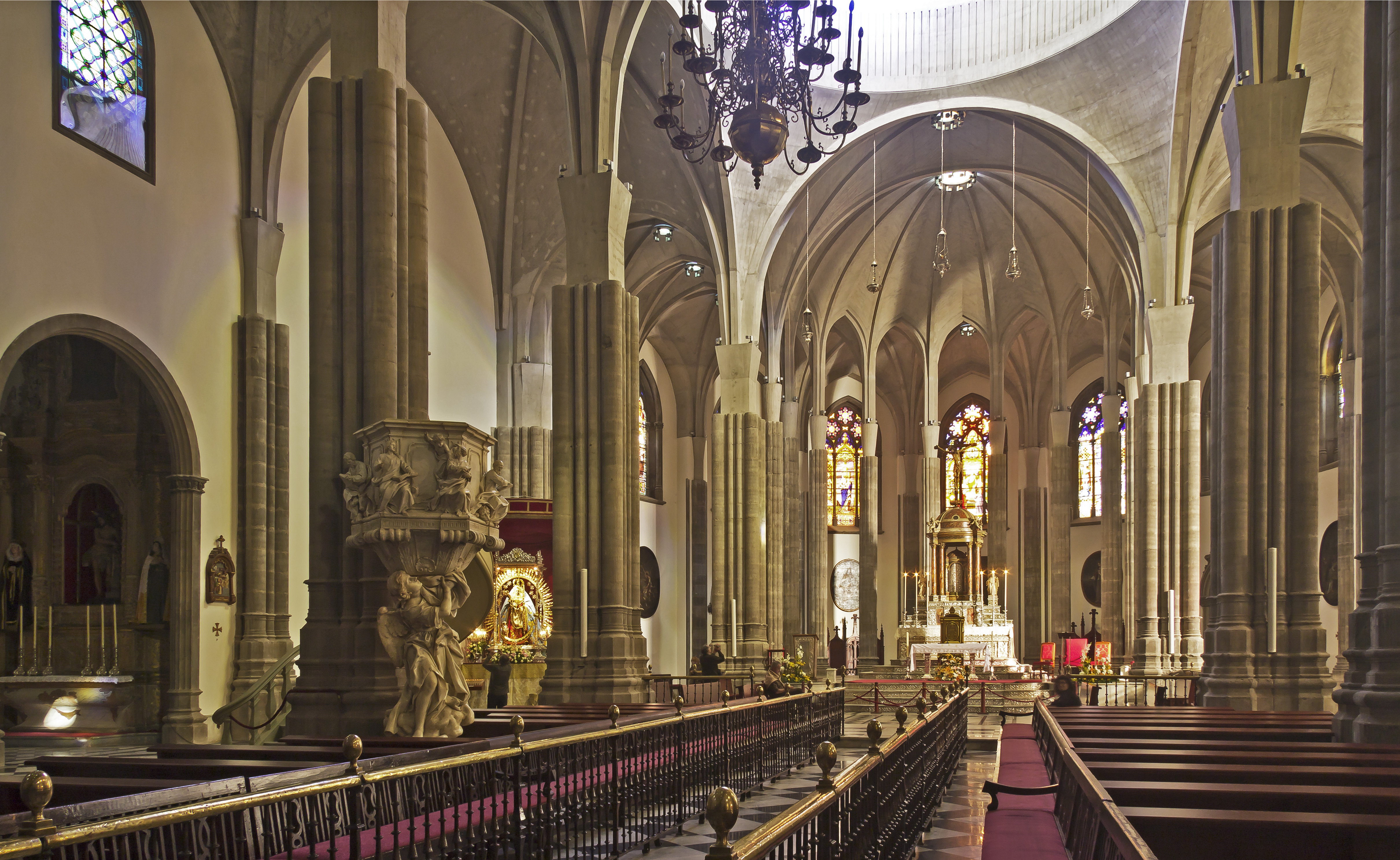 Innenraum der Kathedrale in La Laguna nach der Renovierung 2014